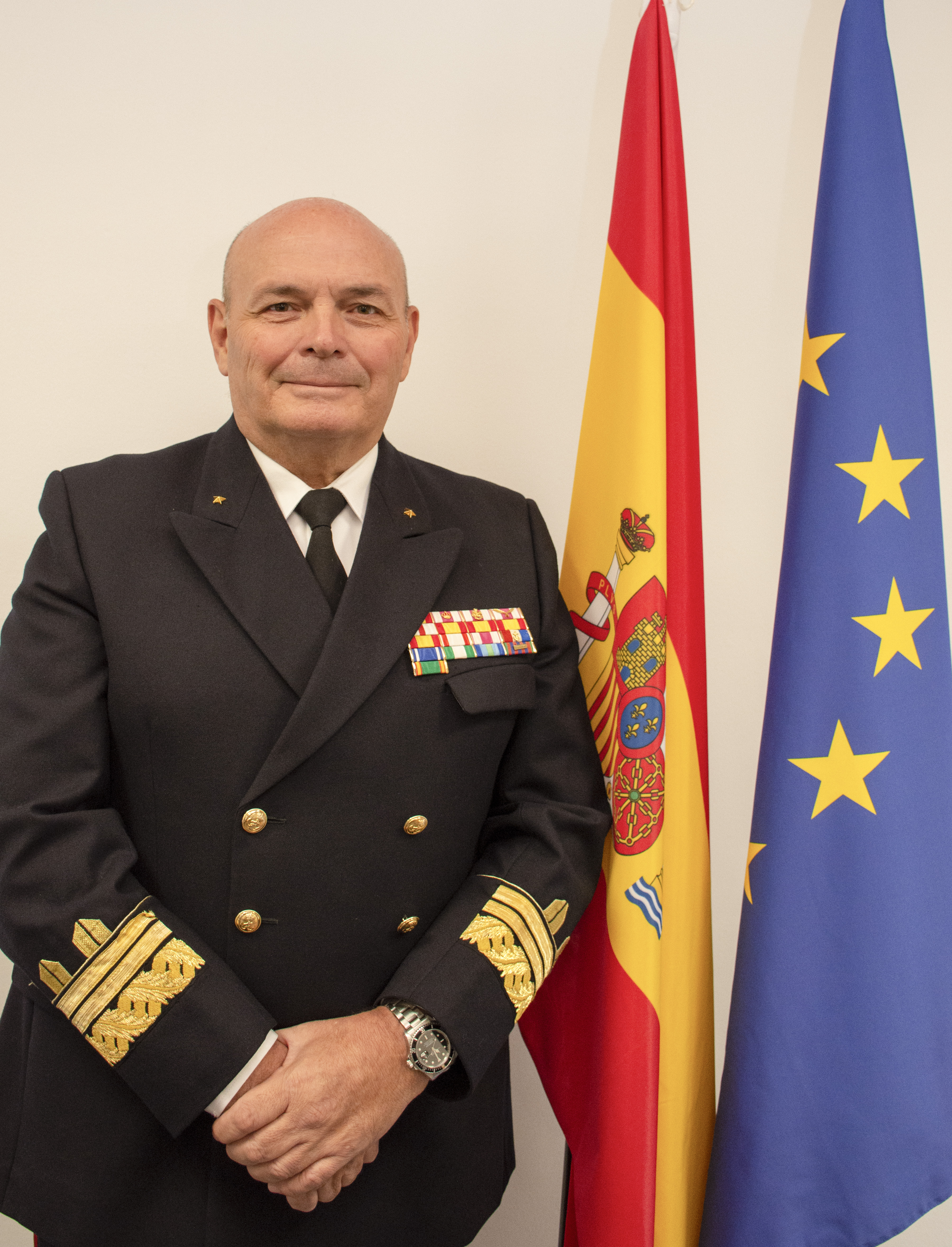 General de división Antonio Planells Palau, Comandante de la Operación Atalanta.